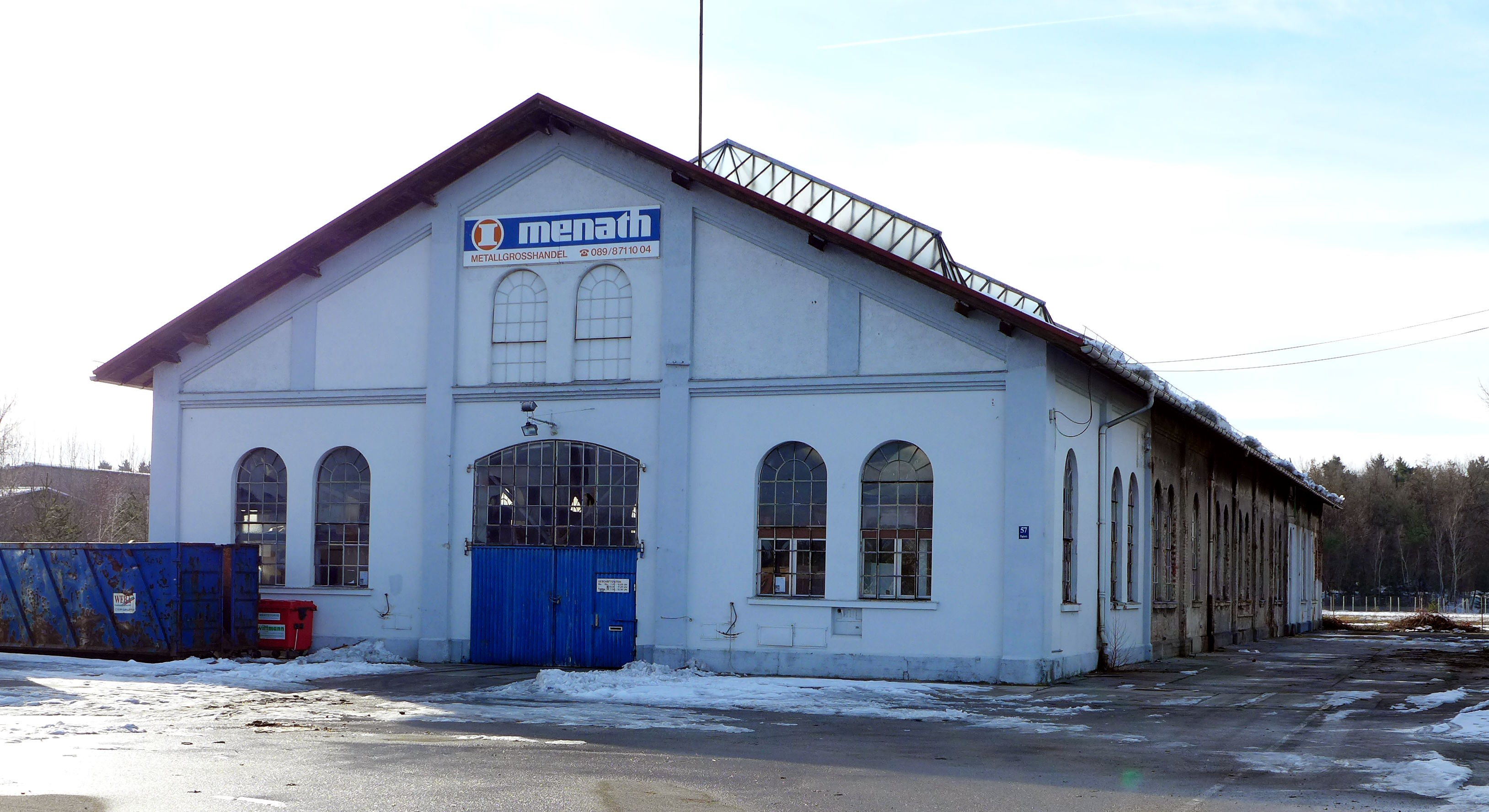 Papinstr. 53 Bau11, München